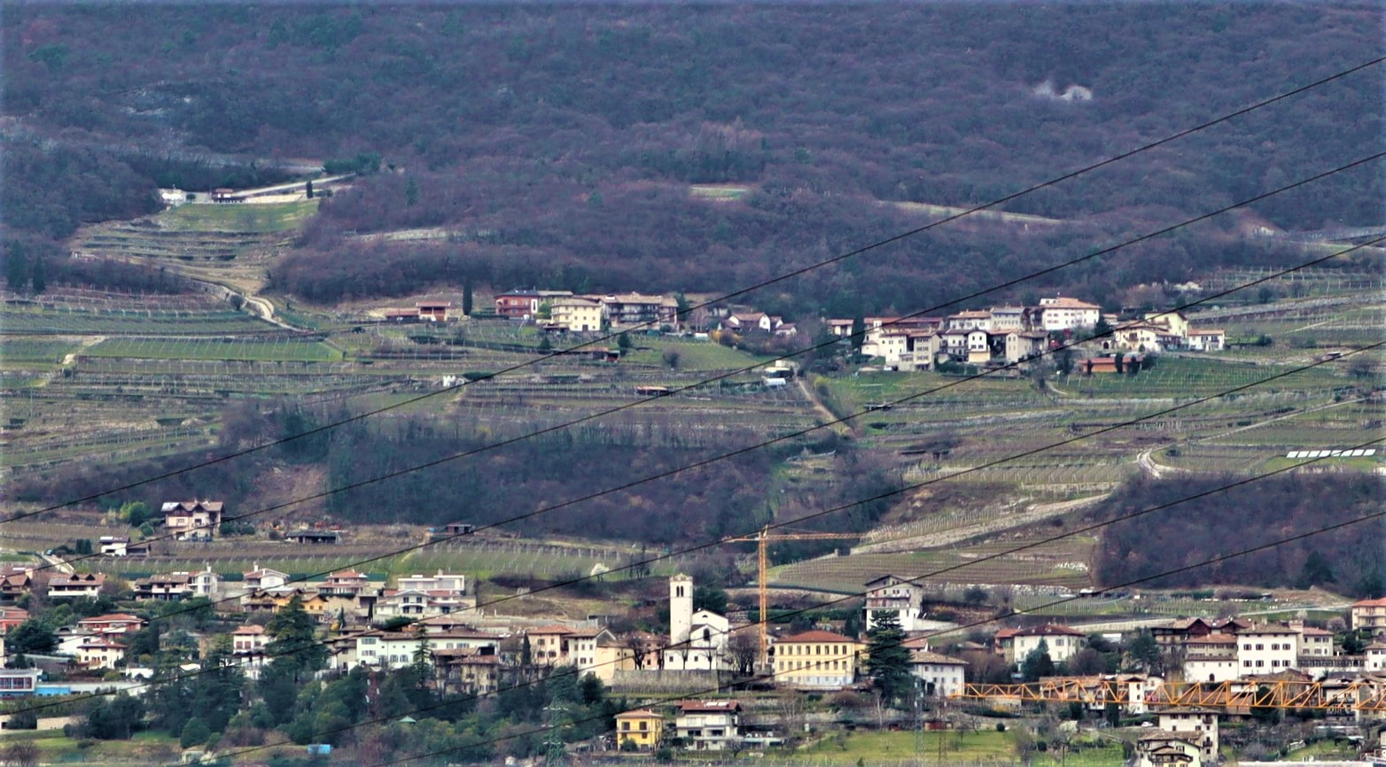 Panorama di Isera visto da Rovereto